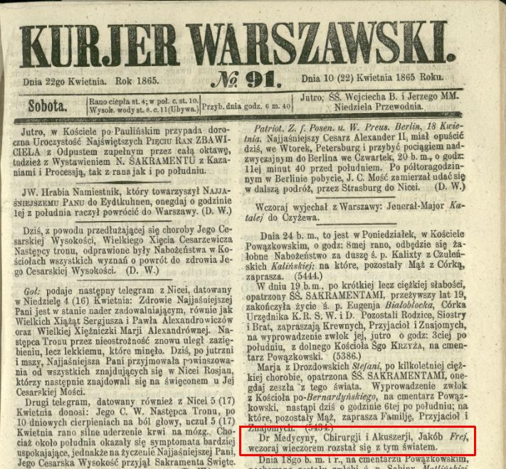 Strona Kuriera Warszawskiego z 1865 r.